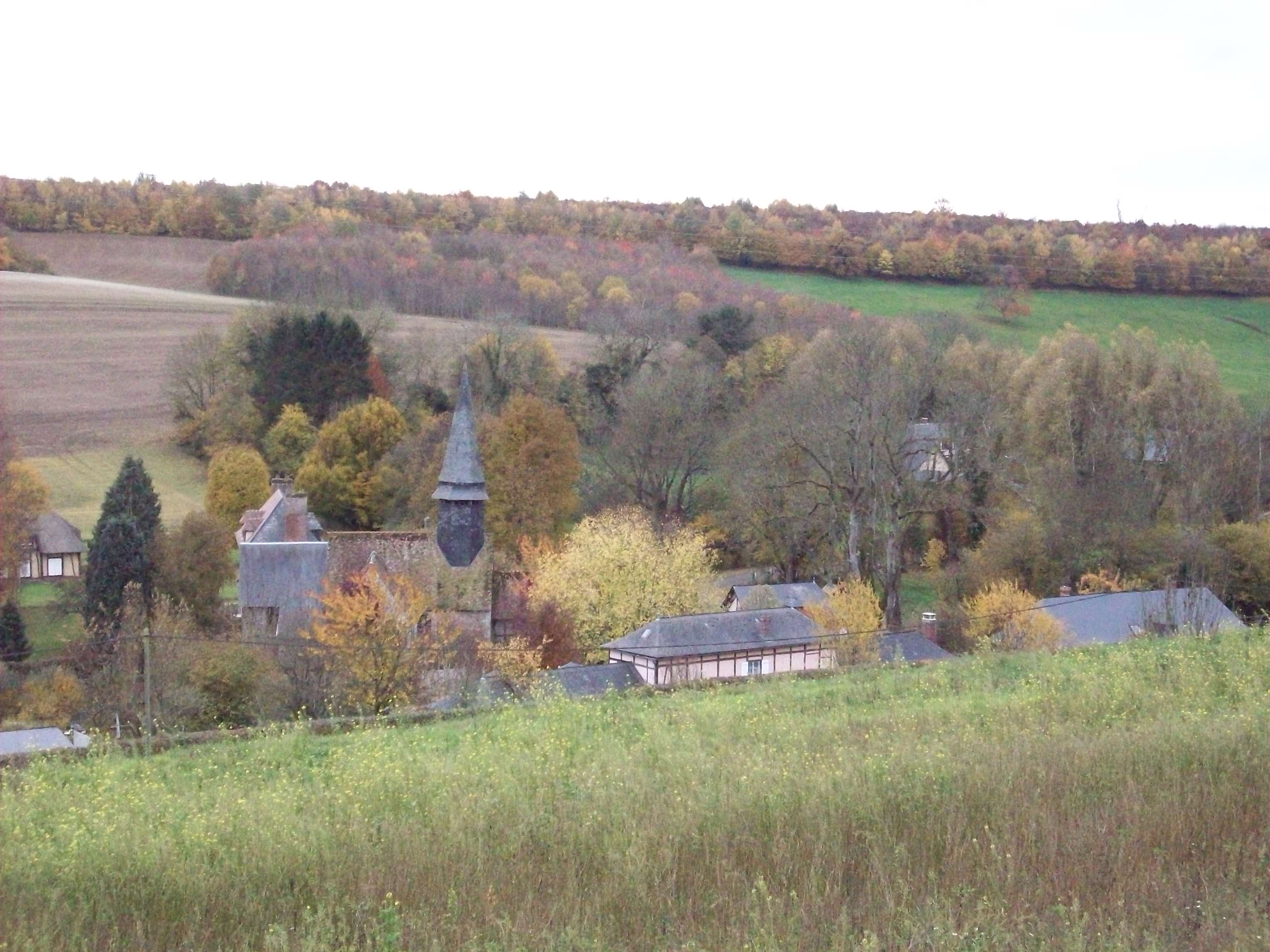 Vue de Lorleau depuis la route menant au Tronquay.